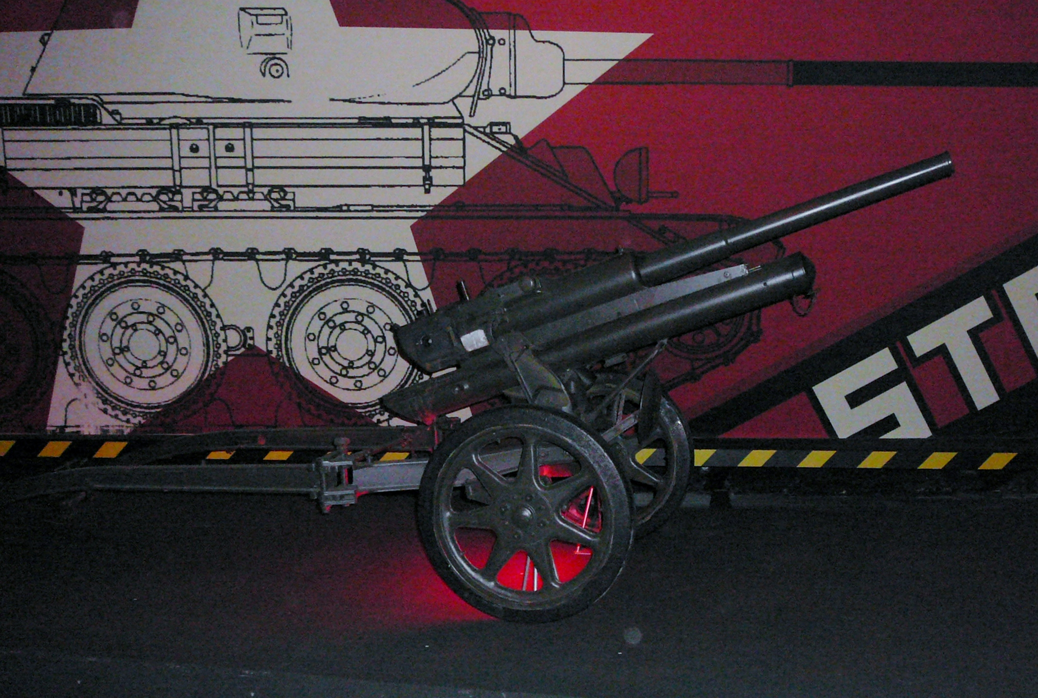 47 32 - Museo storico degli Alpini